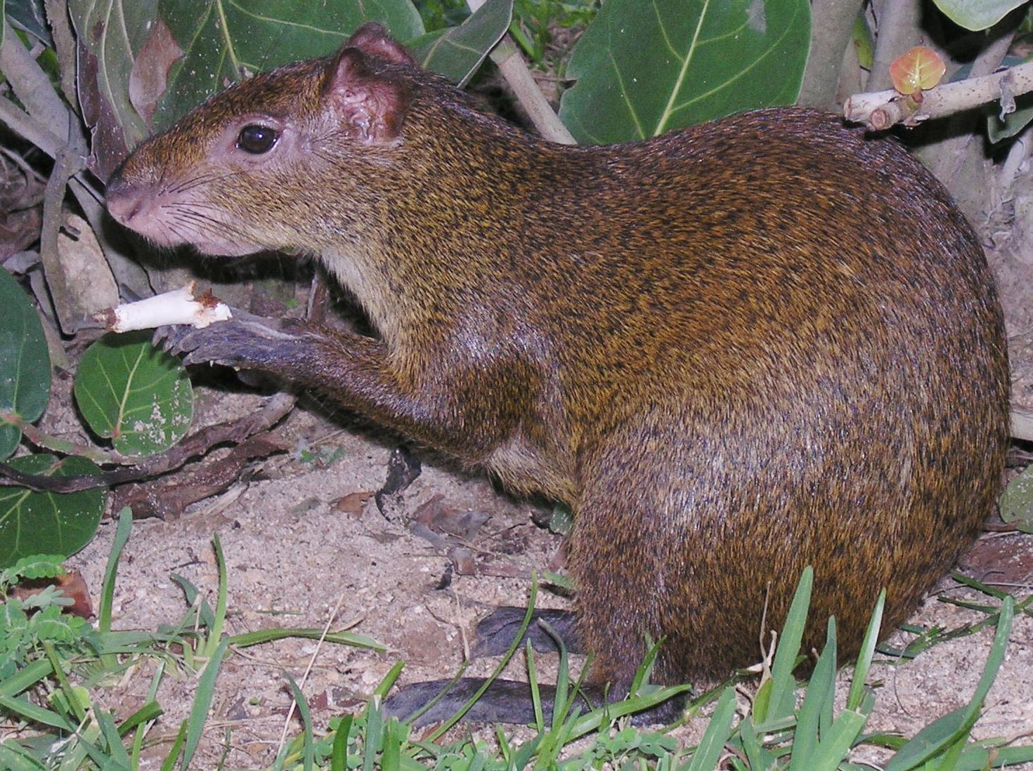 Aguti beim Fressen (selbst fotografiert)